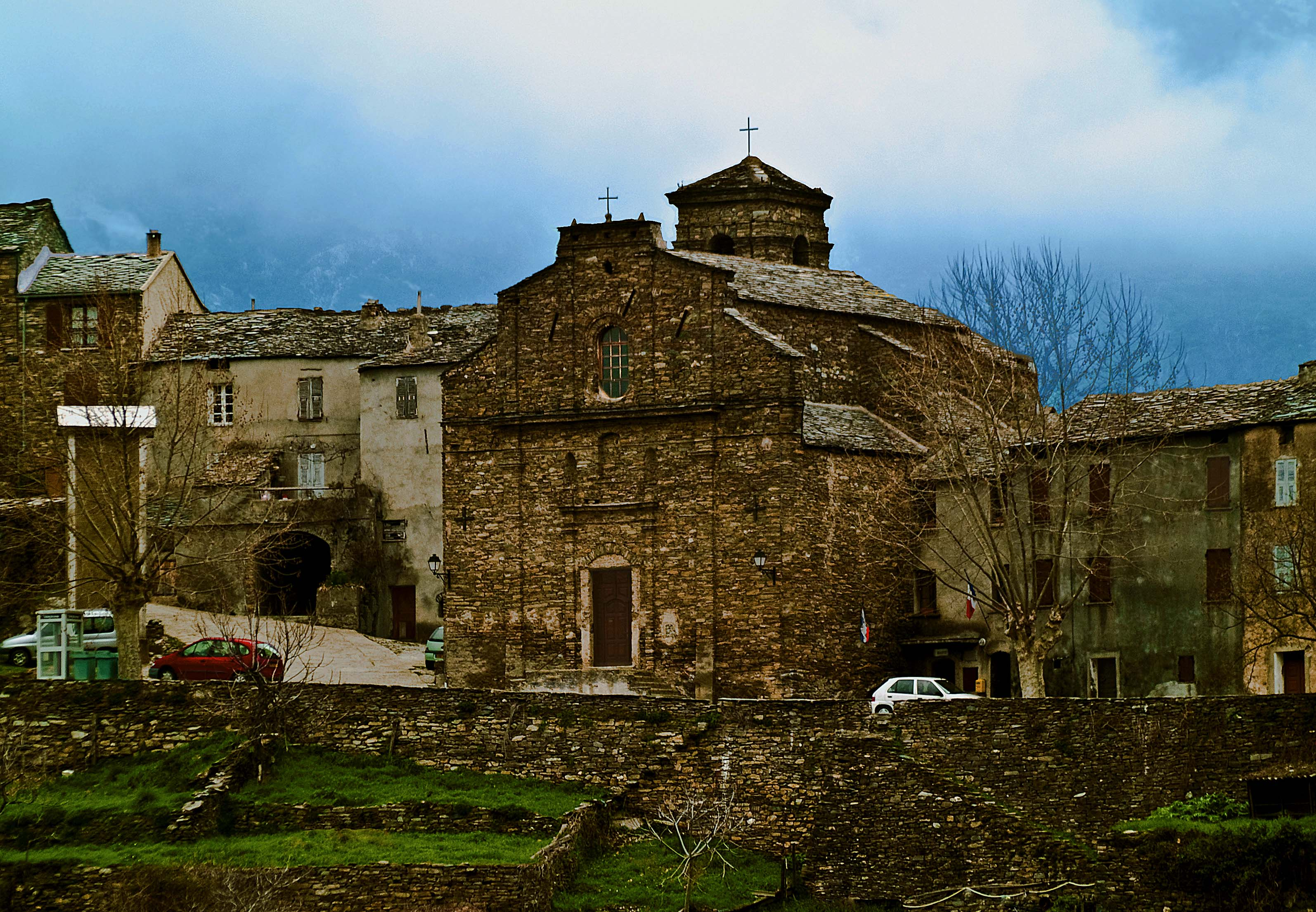 Campi (Castagniccia - Haute-Corse) est un petit village du centre de la Corse à 524 mètres d'altitude. L'église paroissiale Sainte-Marie (Santa Maria) est datée de la fin du XIXe siècle.